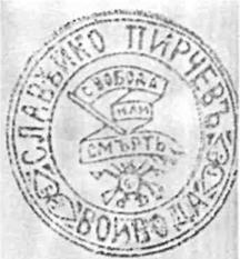 Печат на войводата на ВМОРО Славейко Пирчев.